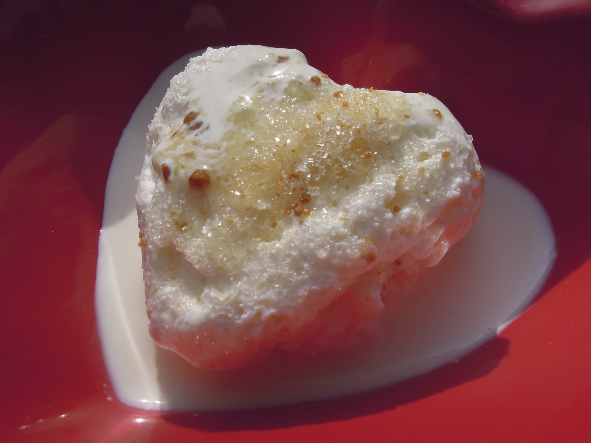 Ici le crêmet d'Anjou traditionnel servi avec de la crème fraîche liquide et du sucre complet de canne.